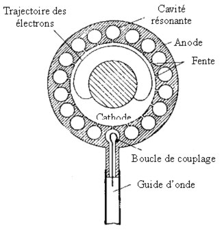 Magnétron de four à micro-ondes auteur : Taveneaux 2 février 2006 à 23:18 (CET)